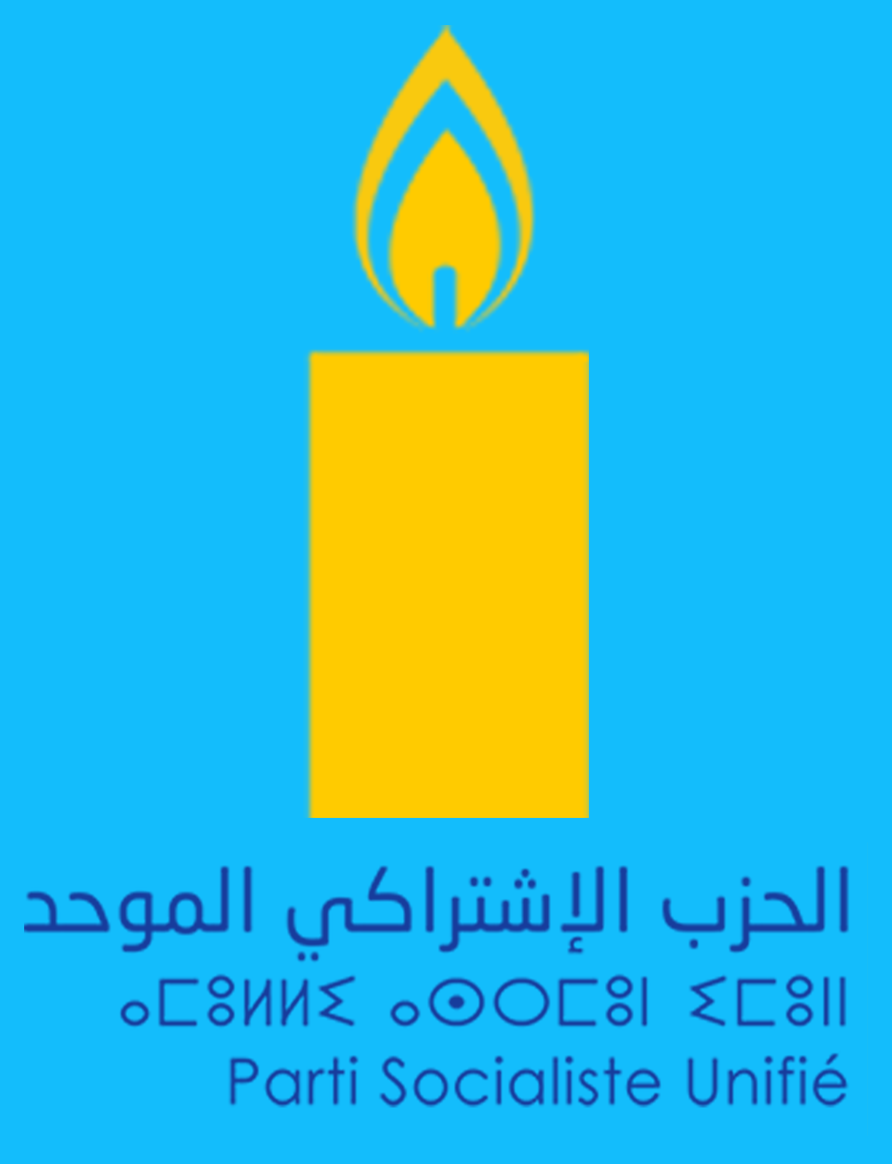 شعار الحزب الاشتراكي الموحد المغرب